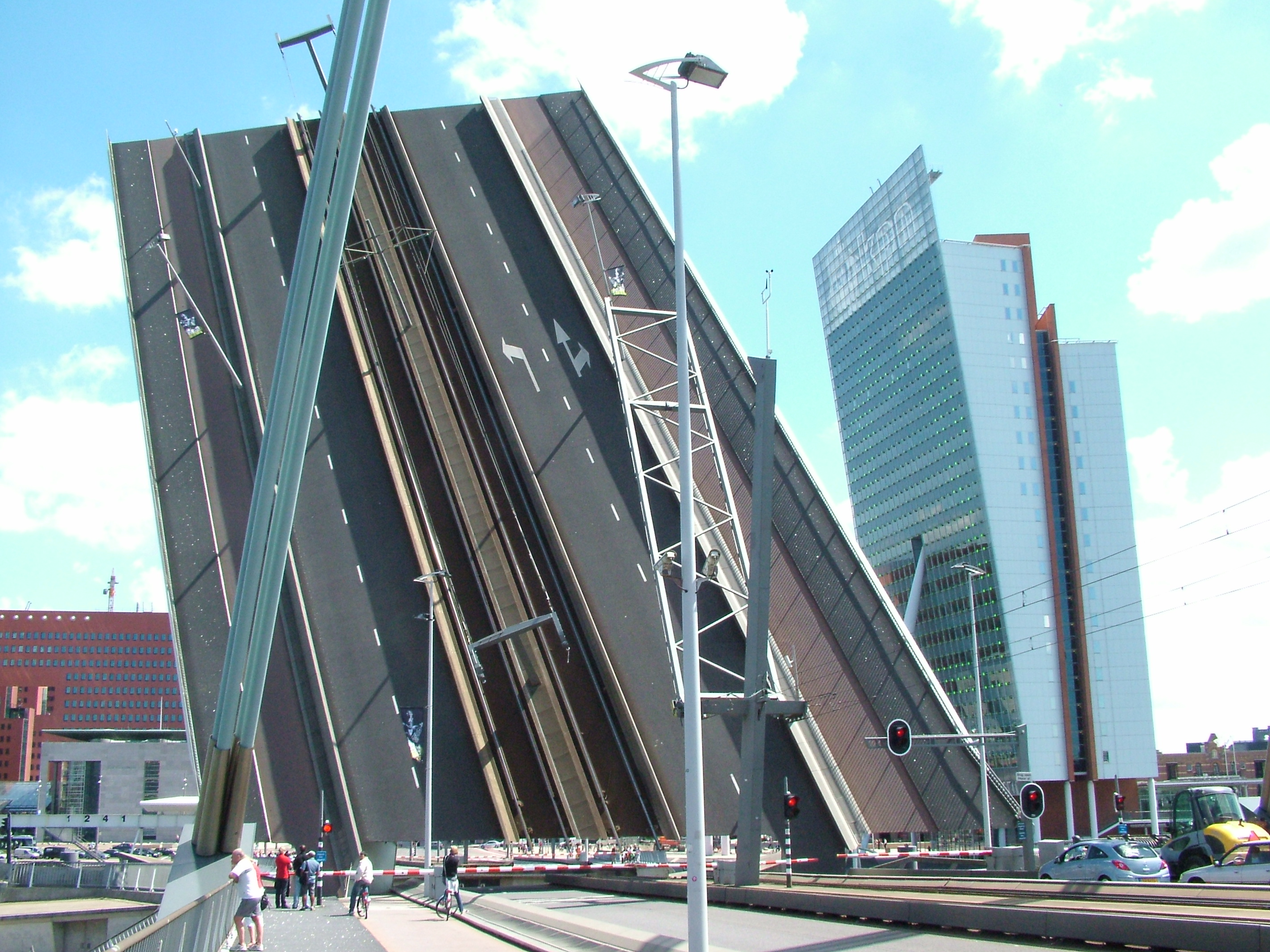 Erasmusbrug open, Rotterdam